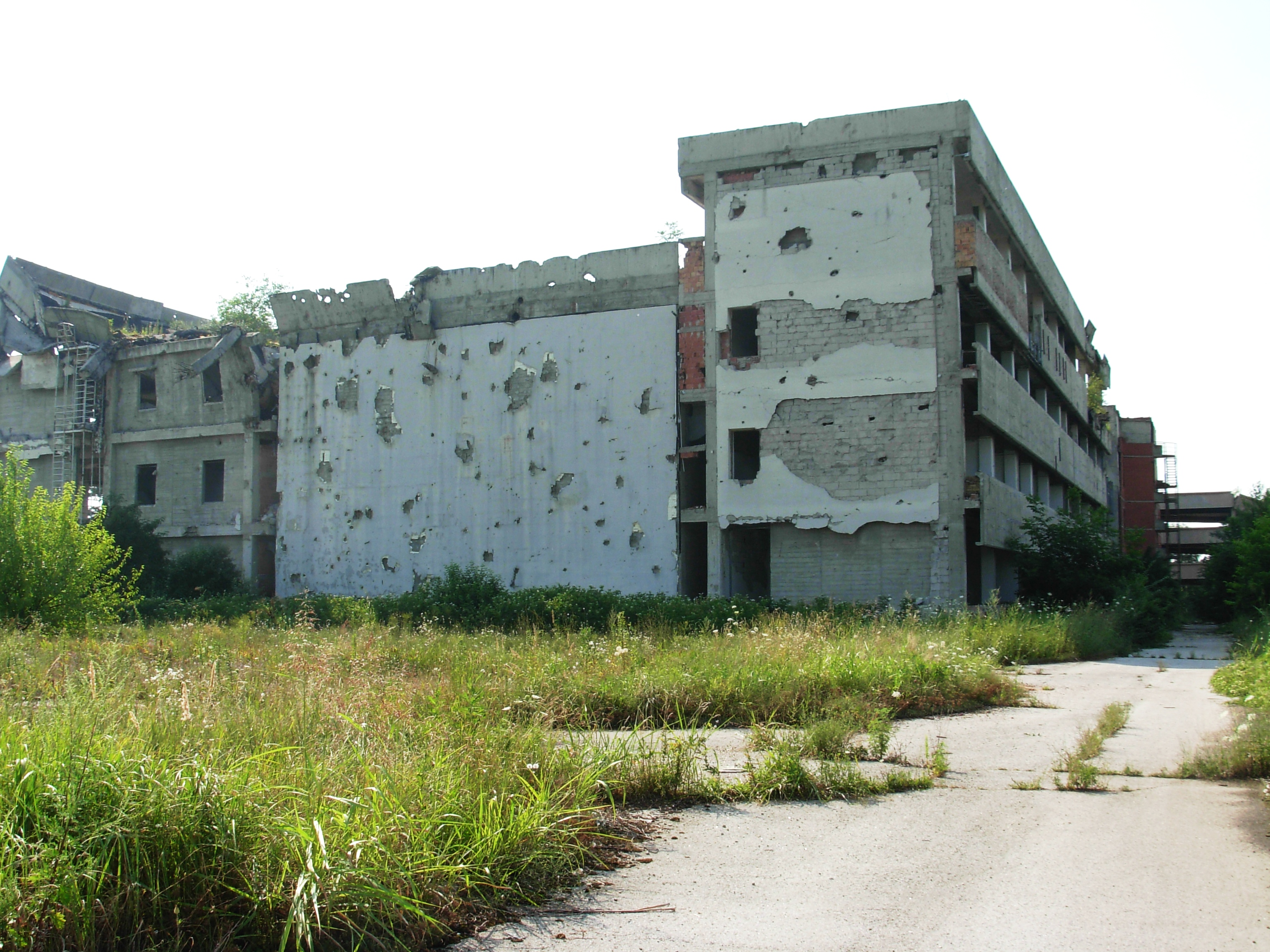 Stará budova televize RTV (Radiotelevizija Vojvodine v Novém Sadu-Mišeluku, poničená bombardováním v roce 1999 a opuštěná